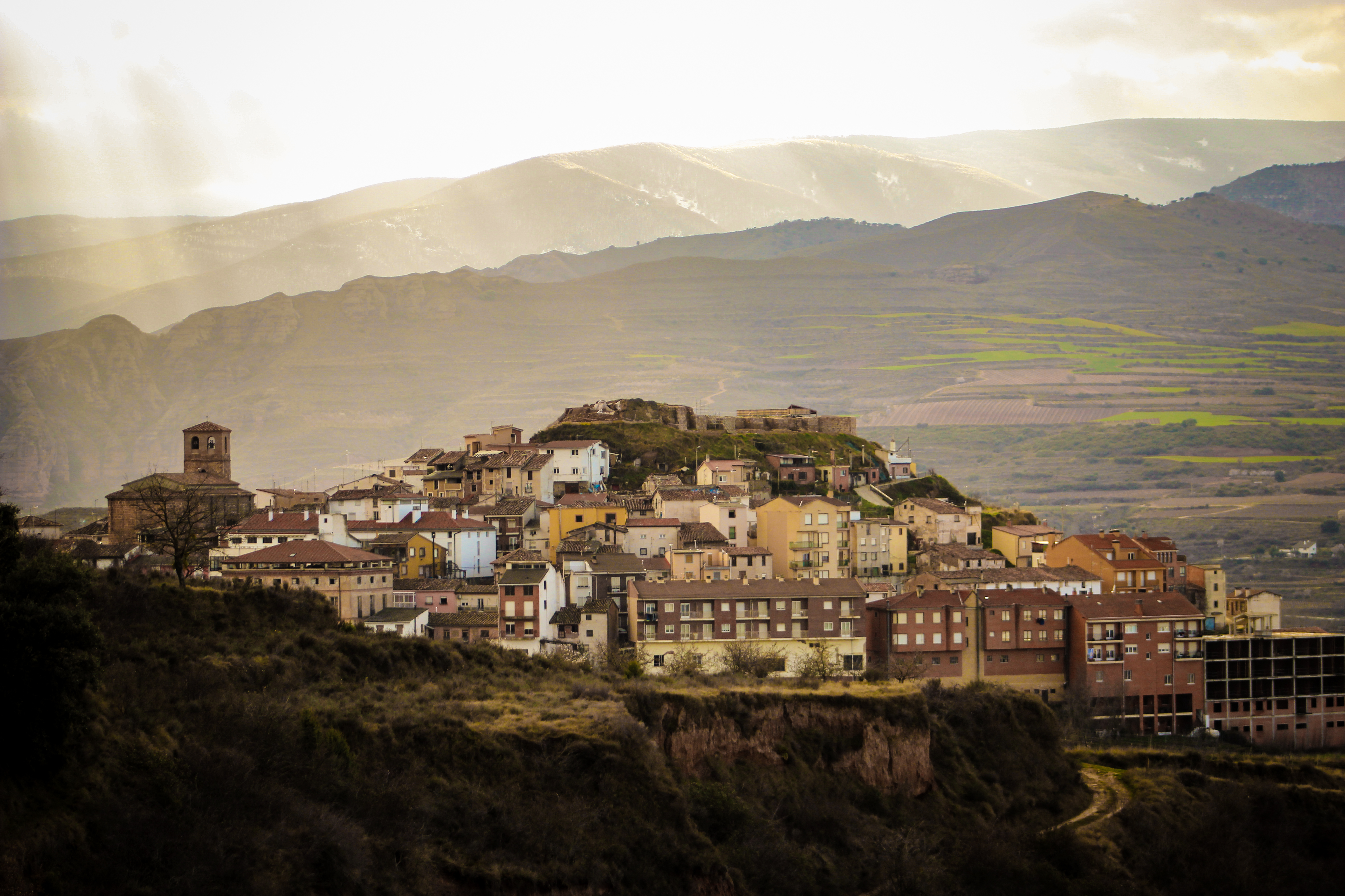 Vista de la localidad de Nalda desde las cuevas de los Palomares